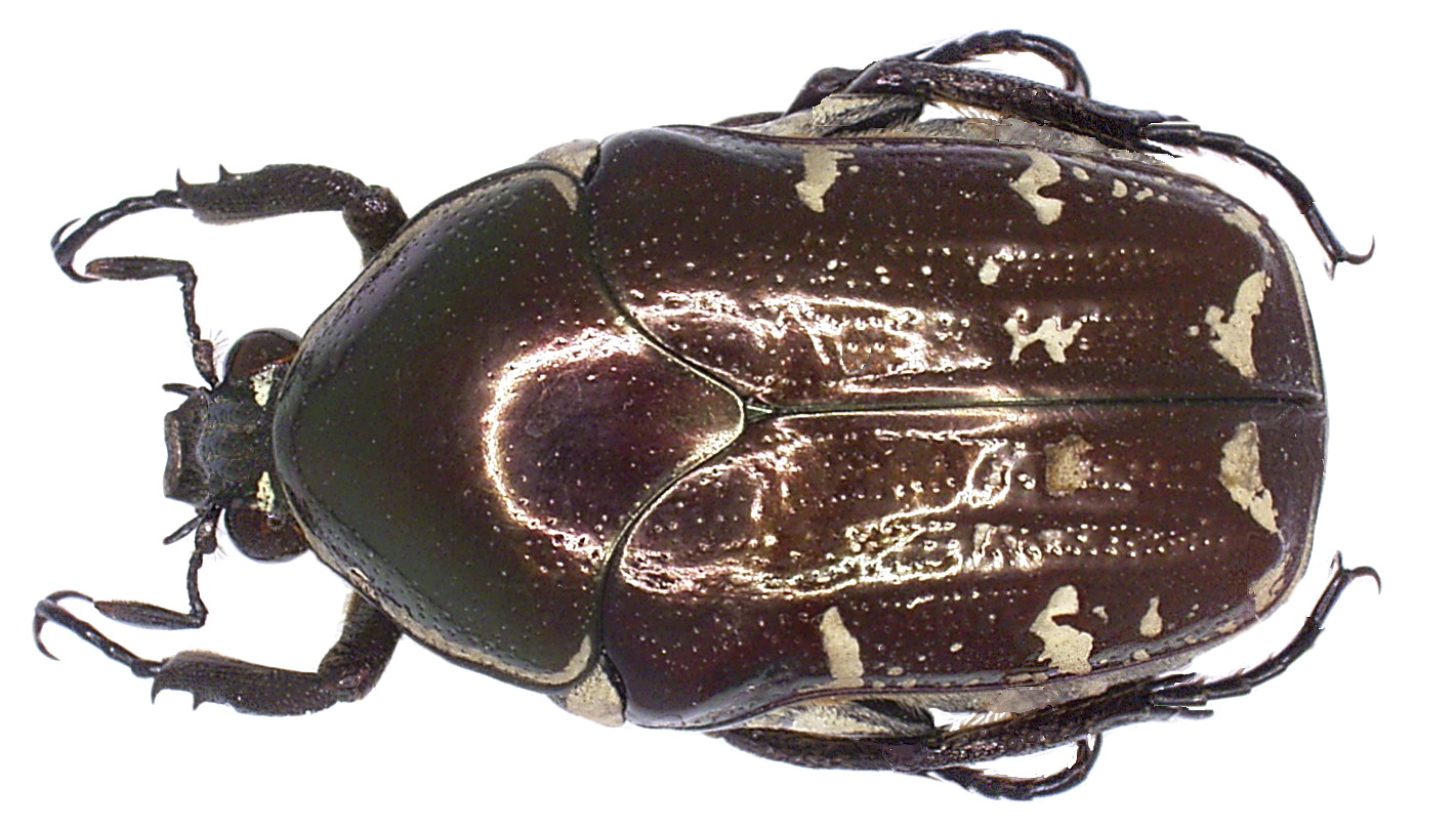 Familie: Scarabaeidae Grösse: 19 mm Verbreitung: Kolumbien Foto: U.Schmidt, 2006